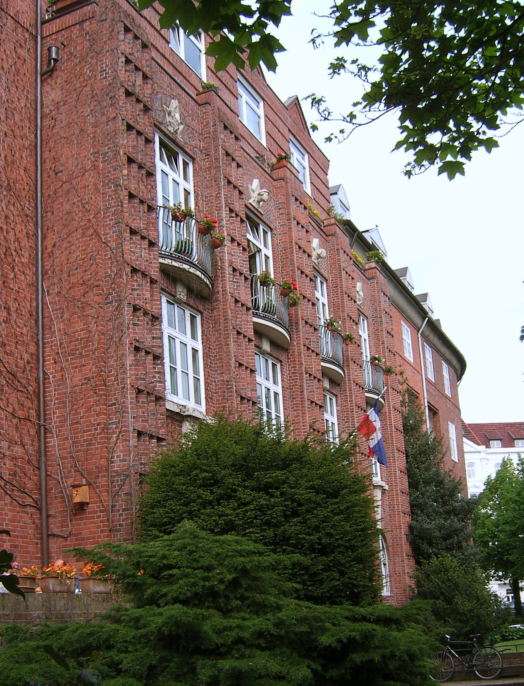 Backsteinbau in der Heilwigstraße in Eppendorf. Sie gehören zu der Gesamtanlage Heilwigstraße 121-125 / Kellinghusenstraße 20, die 1925/26 nach Plänen von William Zwinscher und Ralph Peters erbaut wurde.